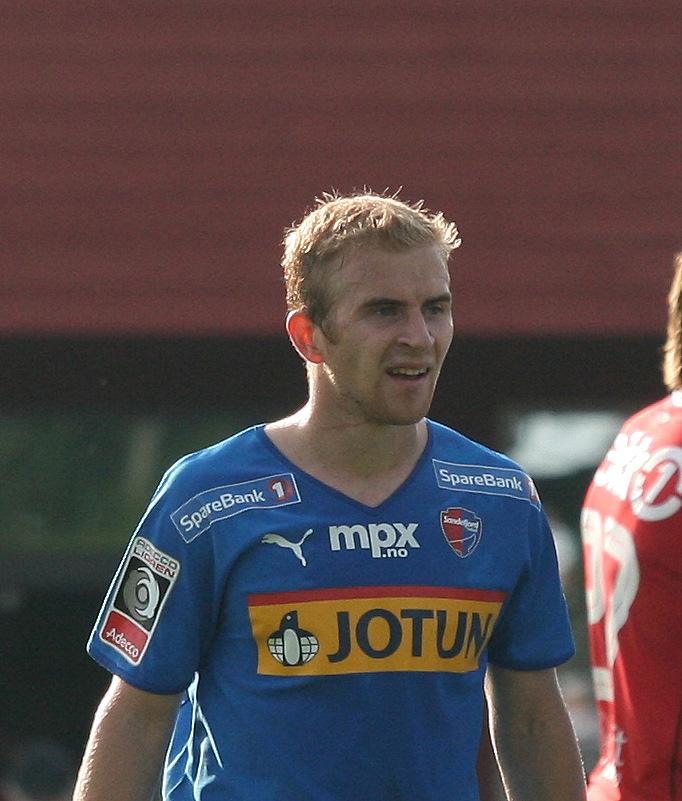 Kari Arkivuo, Sandefjord